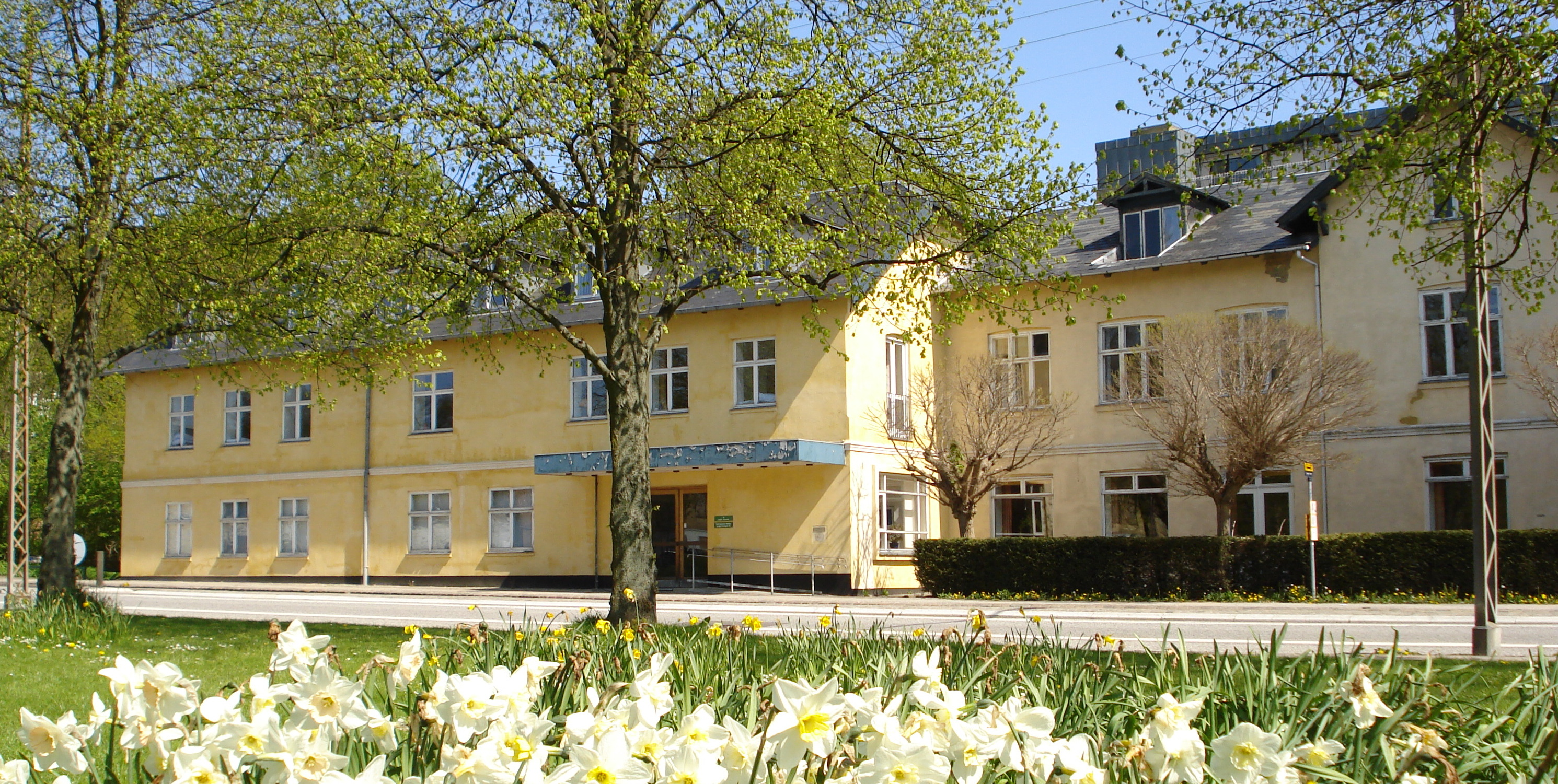 Lyngby Hovedgade 1, Rejsestalden.